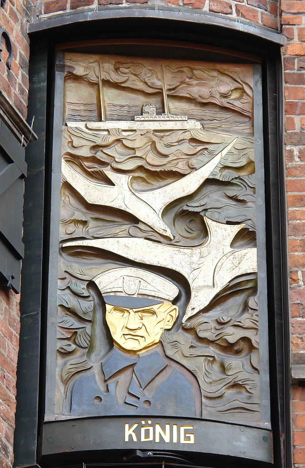 Bernhard Hoetger: Kapitän König (1934, Ozean-Bezwinger auf 10 Bildtafeln). Standort: Haus des Glockenspiels in der Böttcherstraße, Bremen